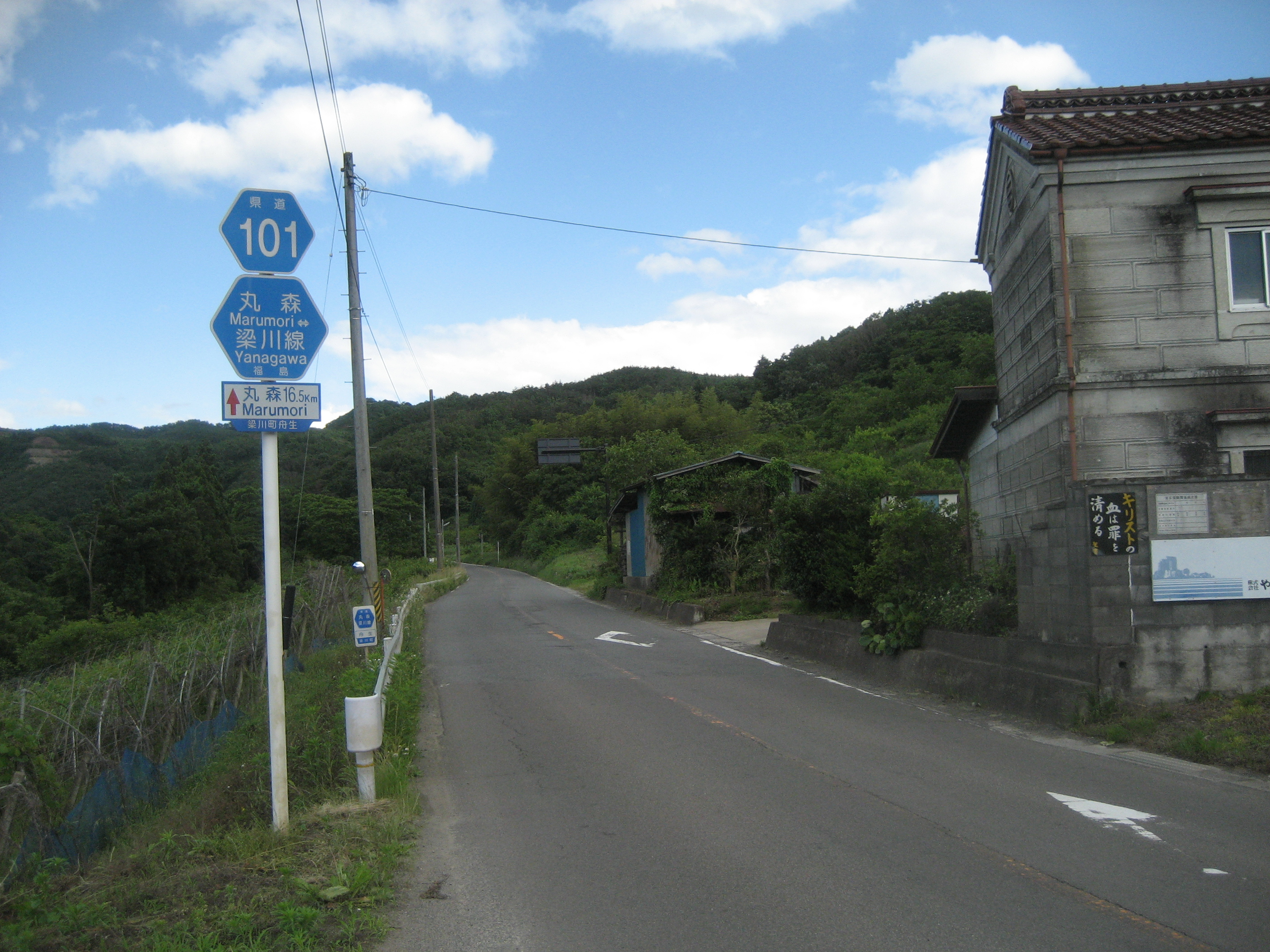 福島県道101号線伊達市梁川町舟生付近